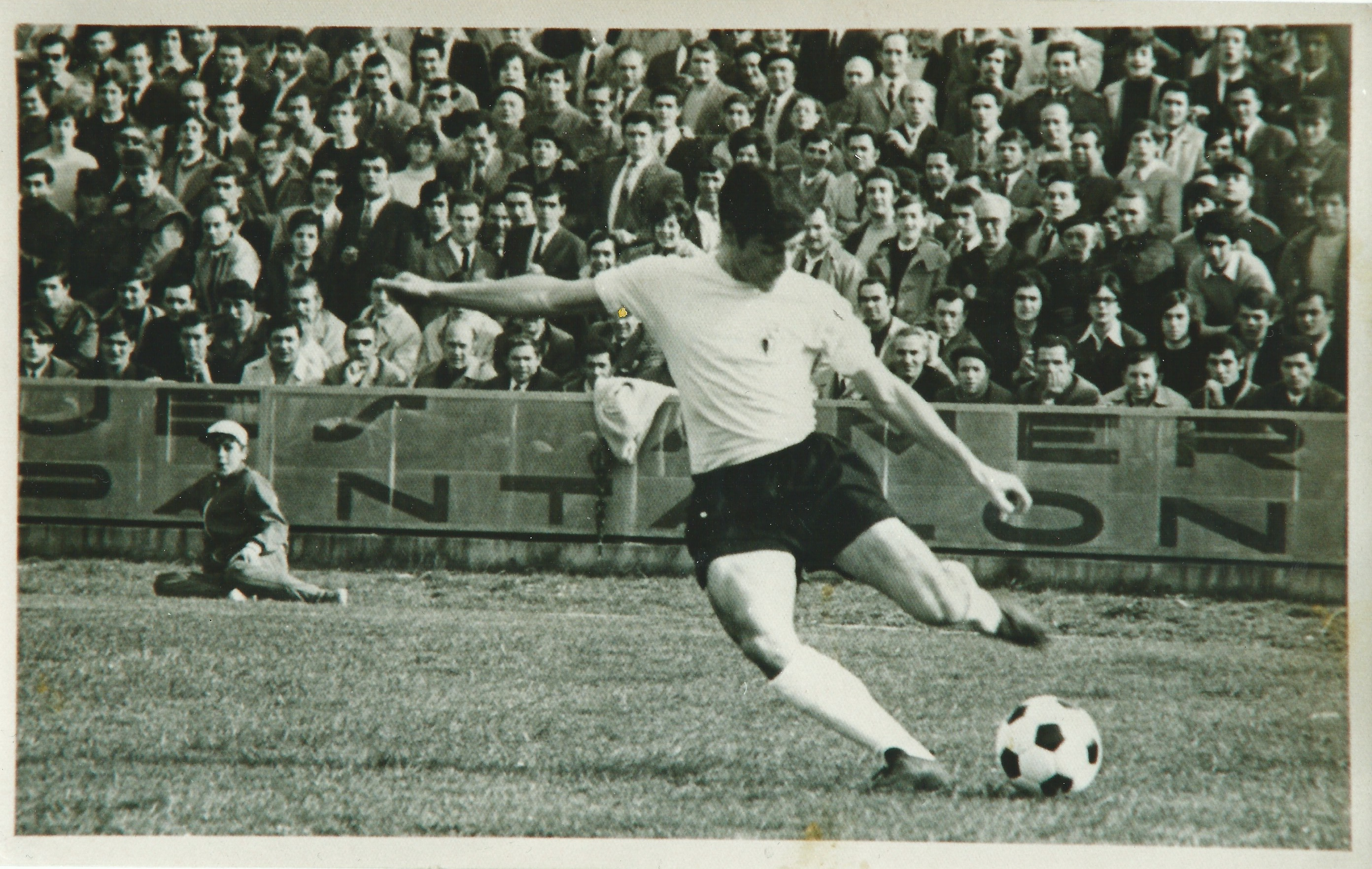 foto cedida al autor por el propio Rufino Requejo